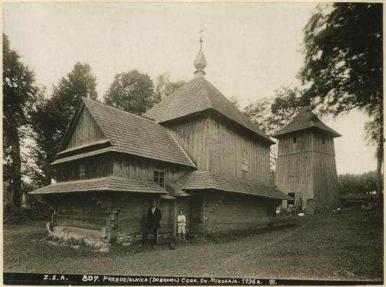 Світлина церкви св. Миколая, с.Передільниця